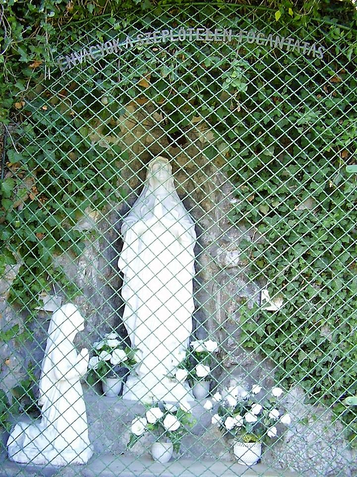 Dédestapolcsányban a Serényi István-emlékkeresztet fölött található a sziklába vájt Lourdes-i Mária-barlang.